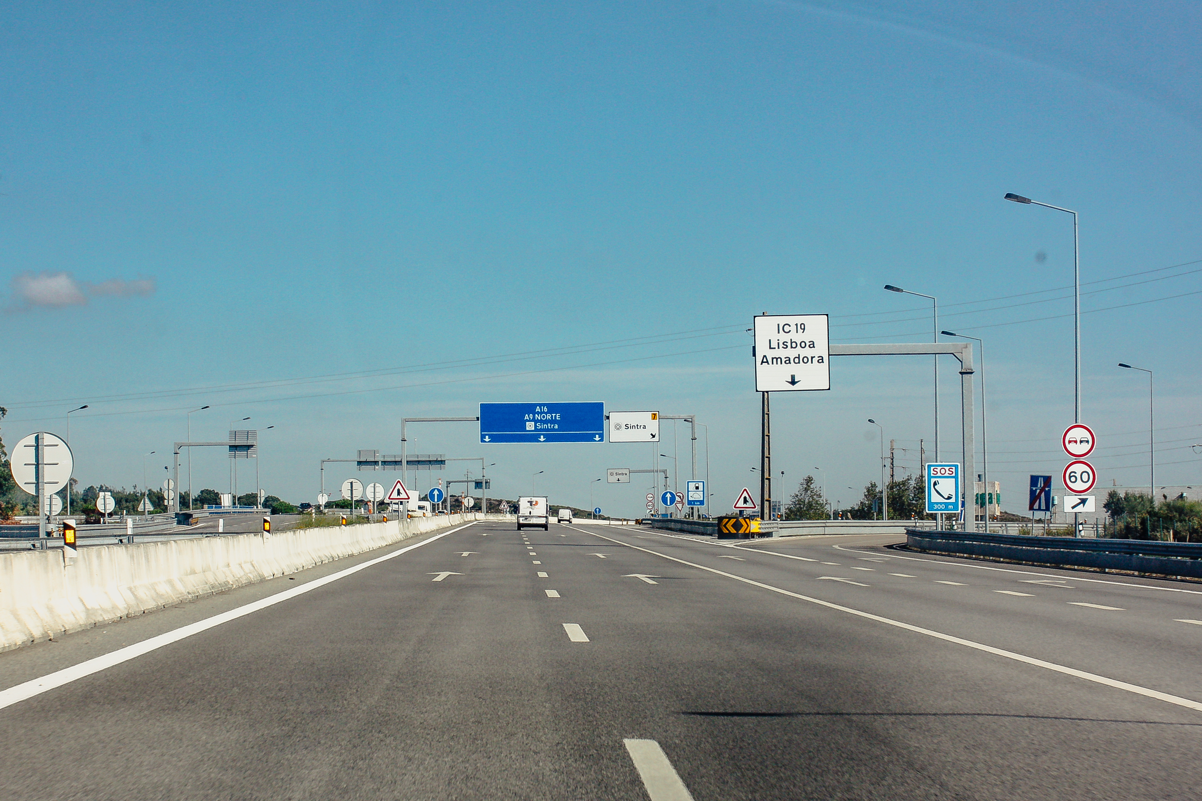 A16 em Ranholas.